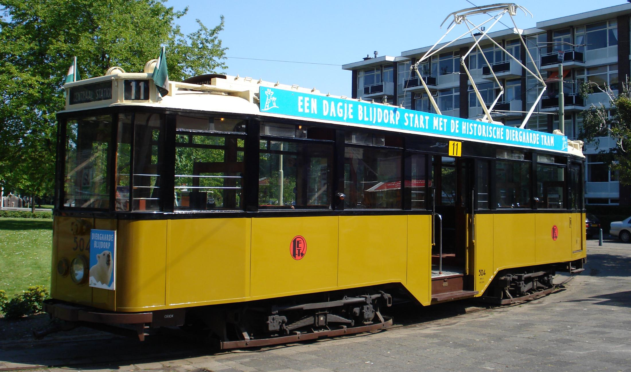 Rotterdam Blijdorp. Historische tram.